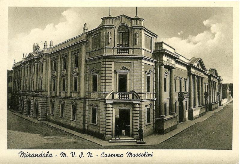 Caserma Mussolini negli anni 1930